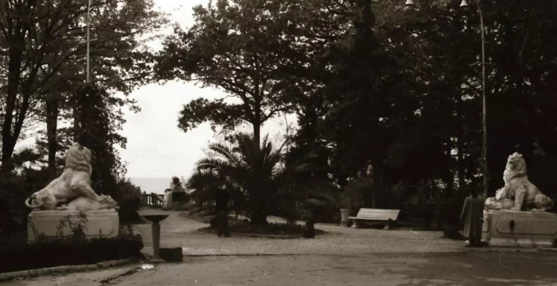 Памятник Сочи "Якорь и пушка" (на заднем плане) "Лев попирающий кабана"